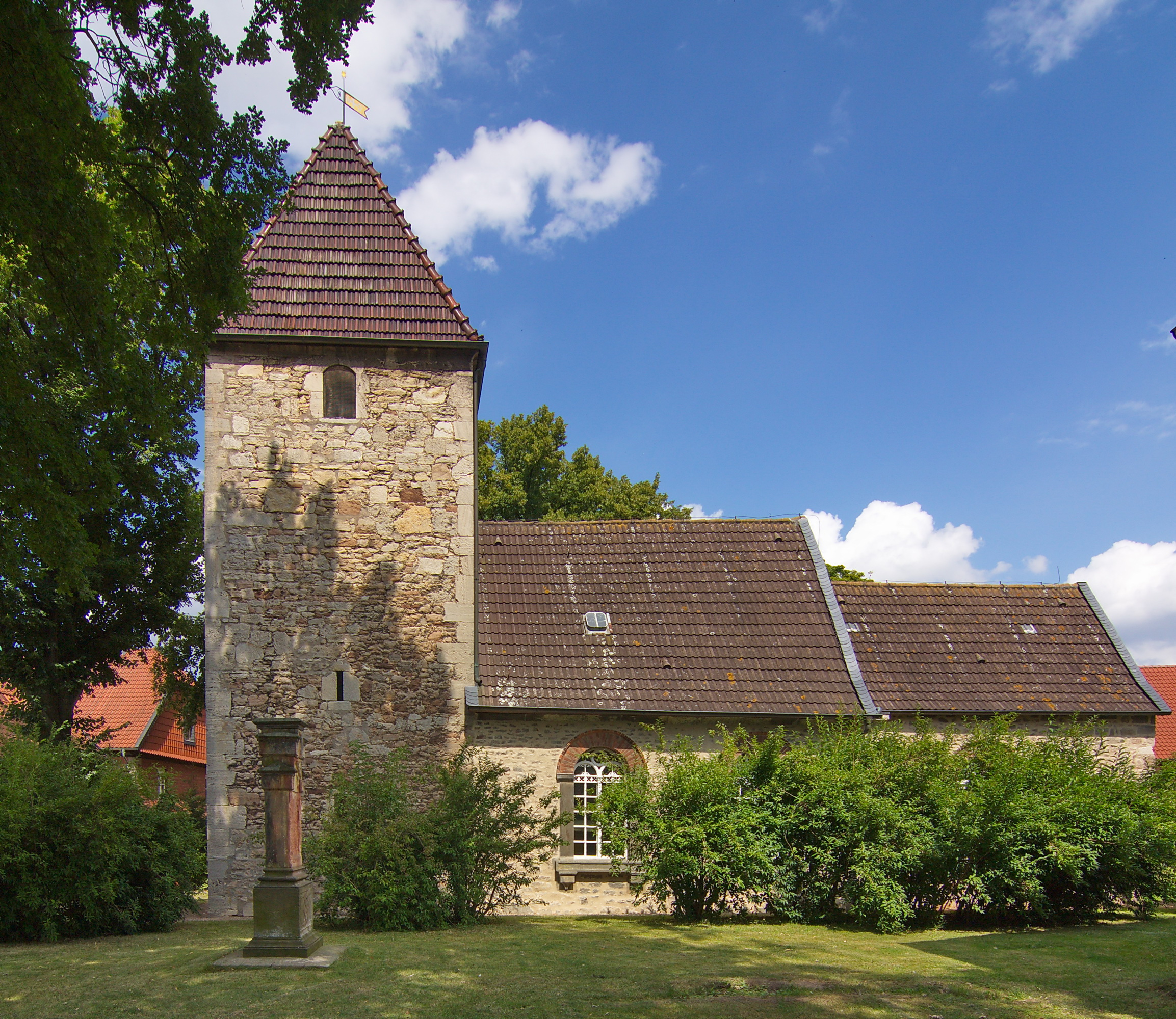 Die St.Urban-Kirche in Wierthe (Vechelde) wurde vermutlich im 13. Jhd errichtet.